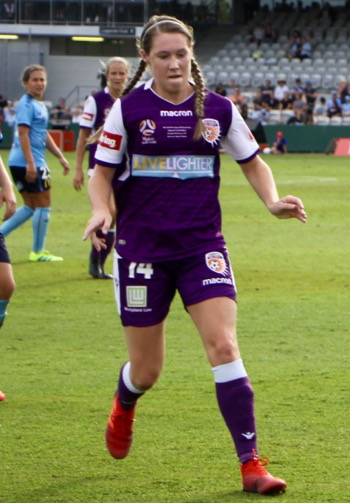 2019GF - Foord